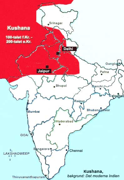 Indien, historia, karta, Kushana, egentillv.